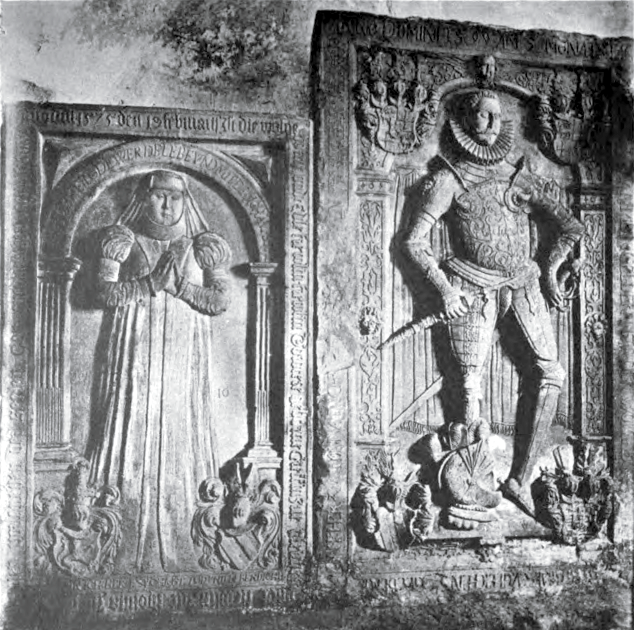 Dorothea und Georg III. von Gleichen, Gräfentonna. Anmerkungen: Dorothea, geboren Gräfin zu Gleichen und Tonna († 1575) und Georg III. Graf zu Gleichen, Spiegelberg und Pyrmont, Herr zu Tonna († 1599)